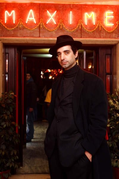 Eu no Cabaret Maxime fotografado pelo meu 6170